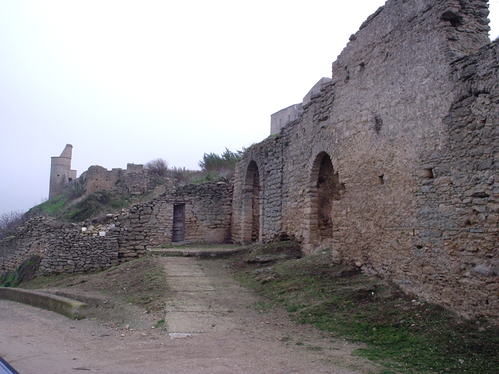 Autore: Rocco Stasi, fatta da me. Porta e torre della Saracena con resti della fortificazione. Costituiscono la testimonianza di uno stabile insediamento arabo nella cittÃ di Tricarico. GFDL, sono l'autore.